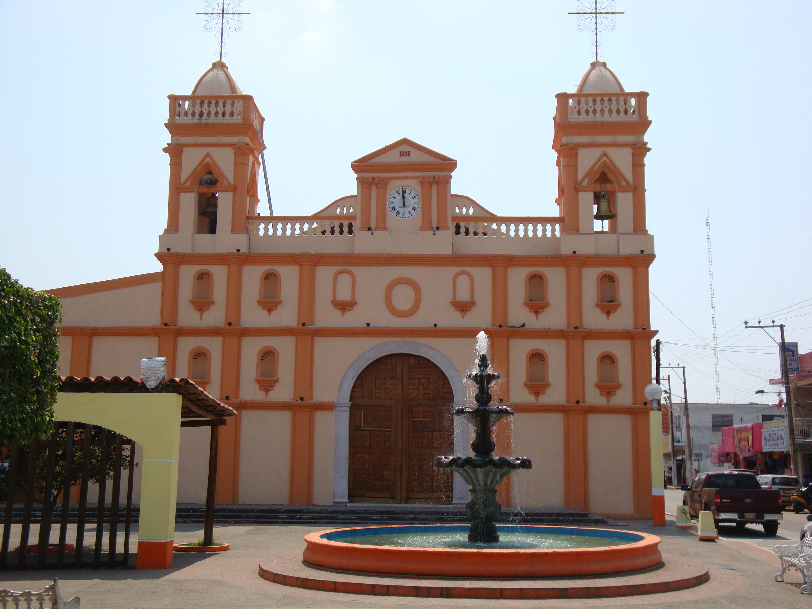 Iglesia de la Virgen de la Natividad, Cunduacán, Tabasco, México. Su construcción inició en 1715 y terminó en 1860